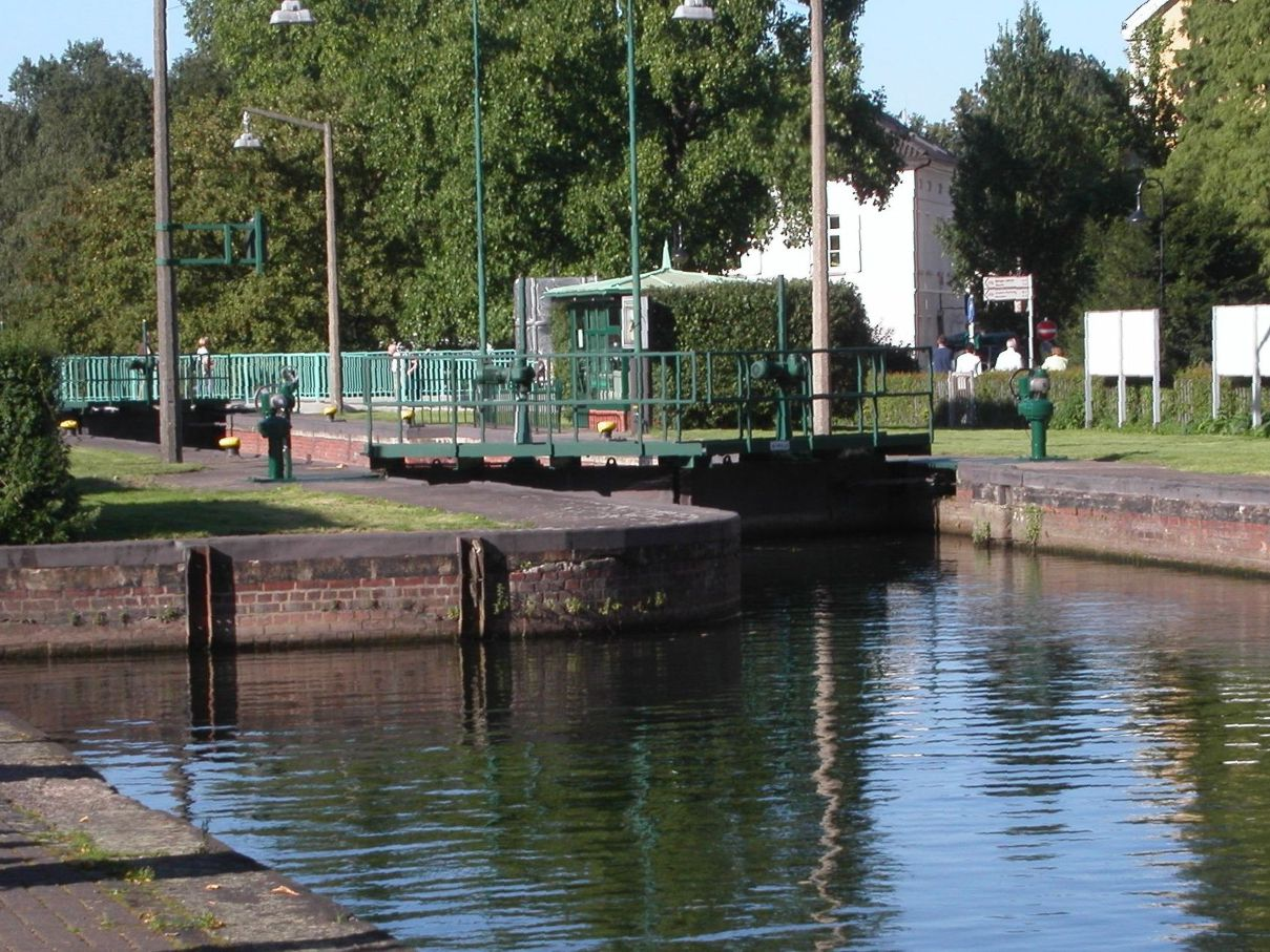 Mülheimer Schleuse